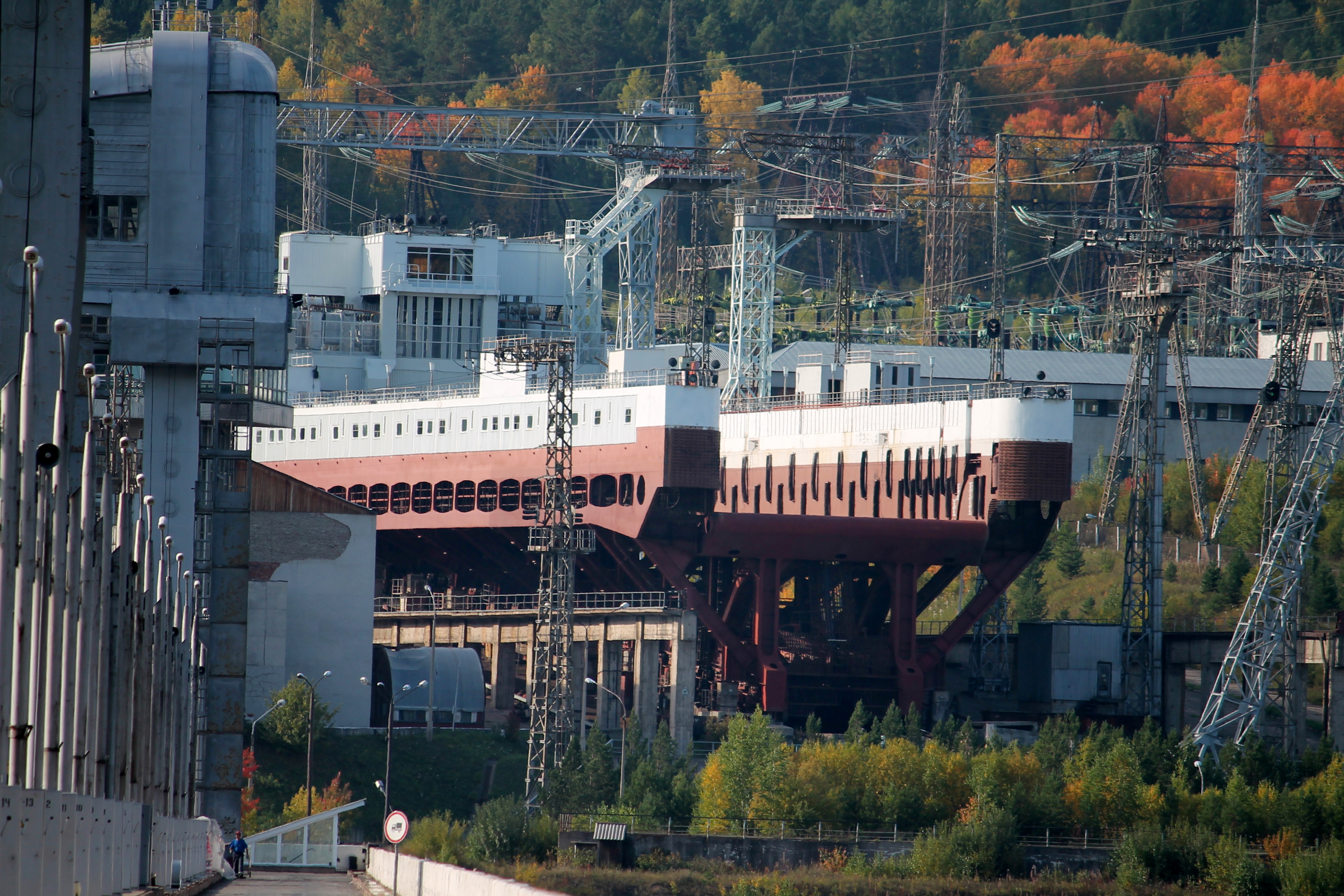 Судоподъёмник Красноярской ГЭС